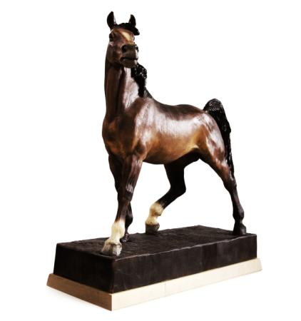 Horse by Henning Engelsen 1980